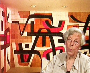 Portrait de Francine Holley